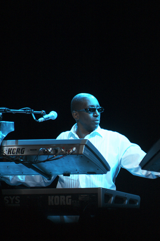 Greg Philinganes in Trondheim, Norway, August 4, 2007.